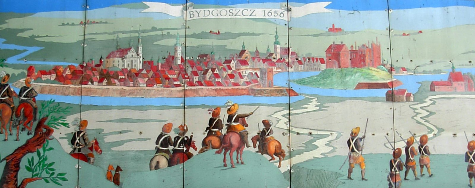 Plansza z widokiem miasta i zamku